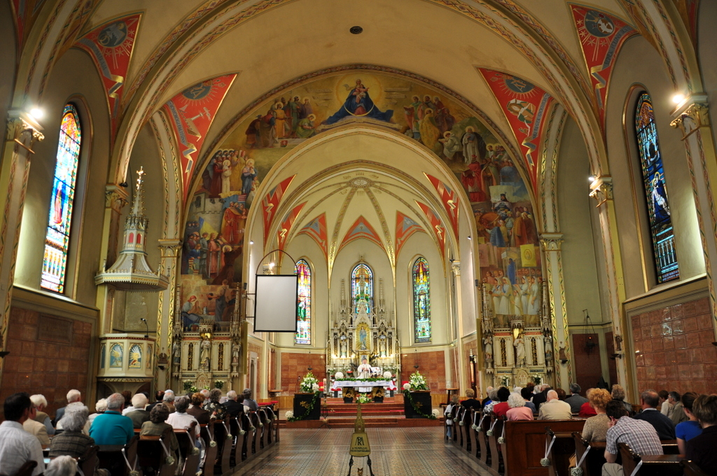 Church of the Nativity of the Virgin Mary in Máriaremete, Budapest, Hungary